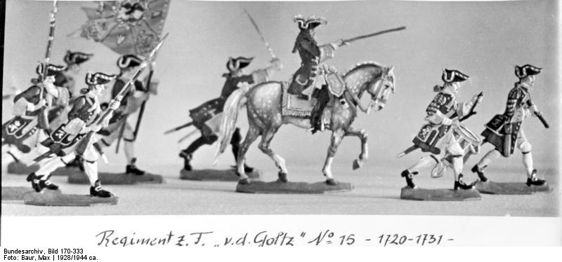 Potsdam.- Zinnsoldaten Regiment z. F. "v.d.Goltz" No 15 ; 1720-1731